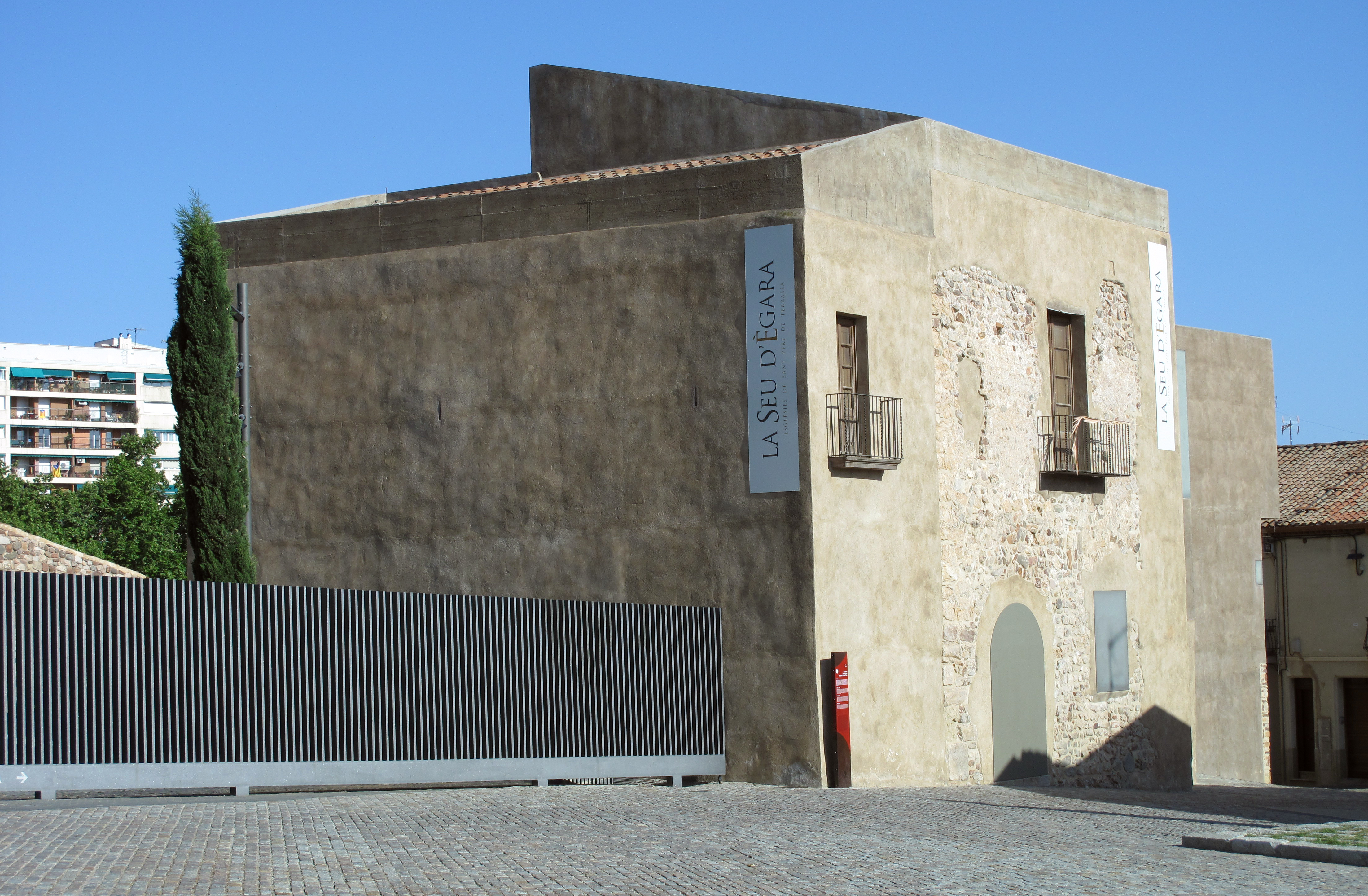 Antiga rectoria de Sant Pere de Terrassa, centre d'interpretació de la Seu d'Ègara